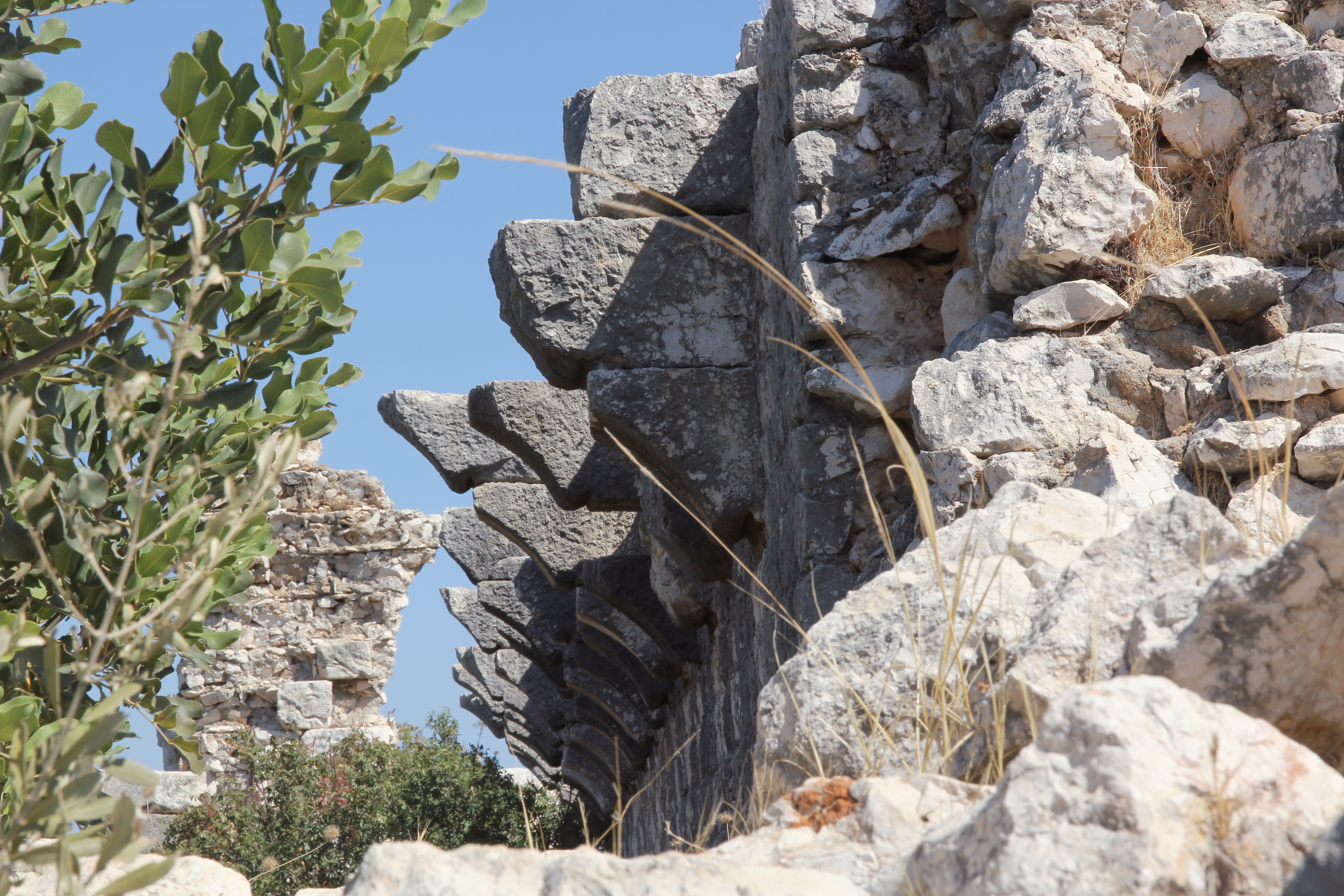 Akkale, byzantinischer Ruinenkomplex bei Kızkalesi, Südtürkei, Palastwand